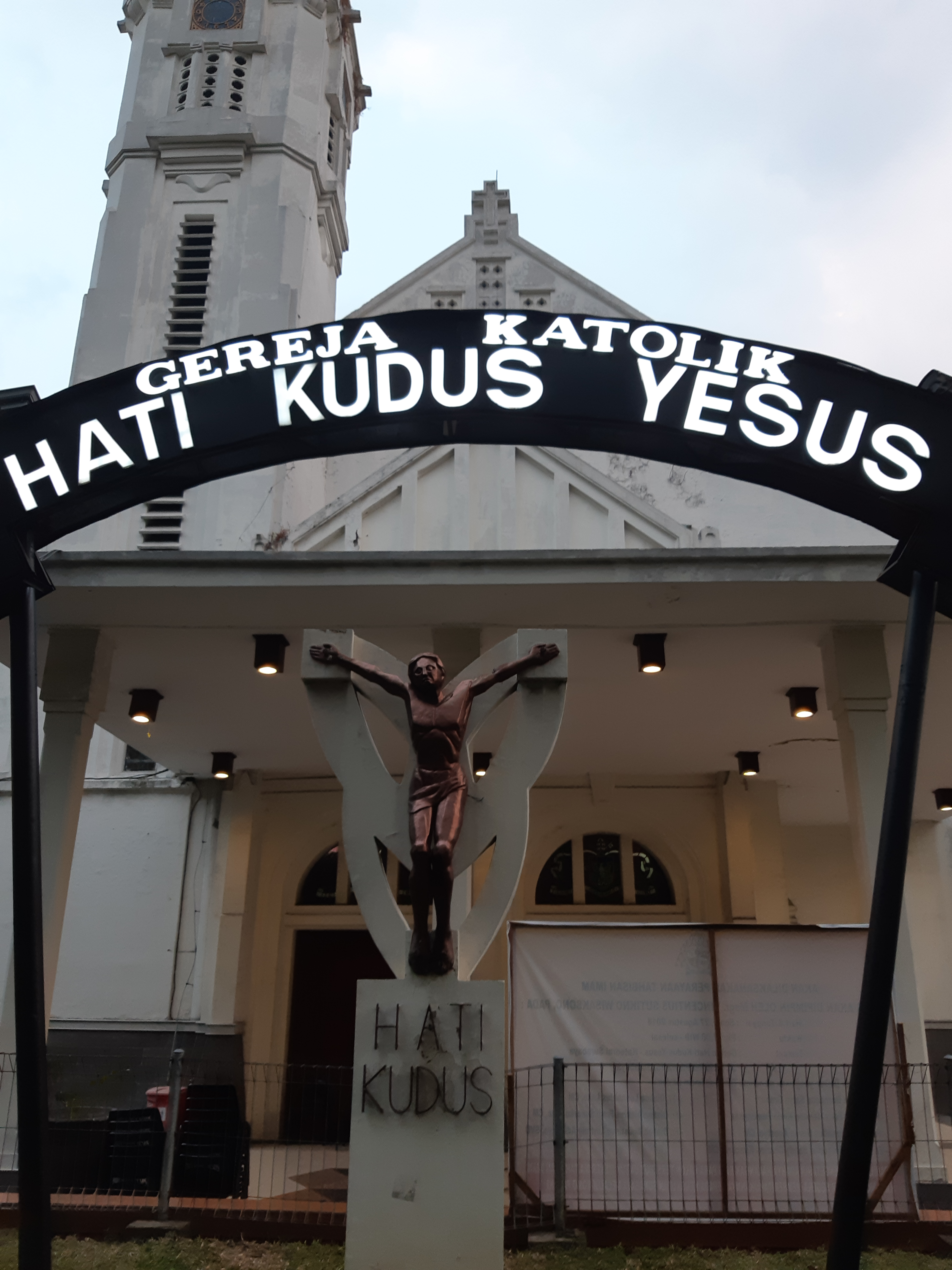 Tampak luar Gereja Katedral Hati Kudus Yesus Surabaya